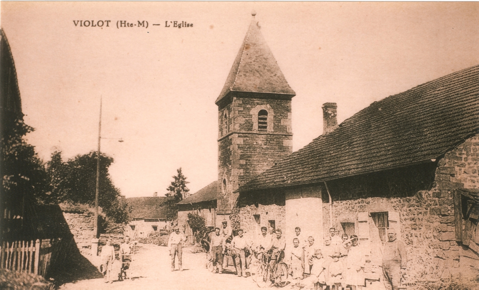 Le village vers 1910.